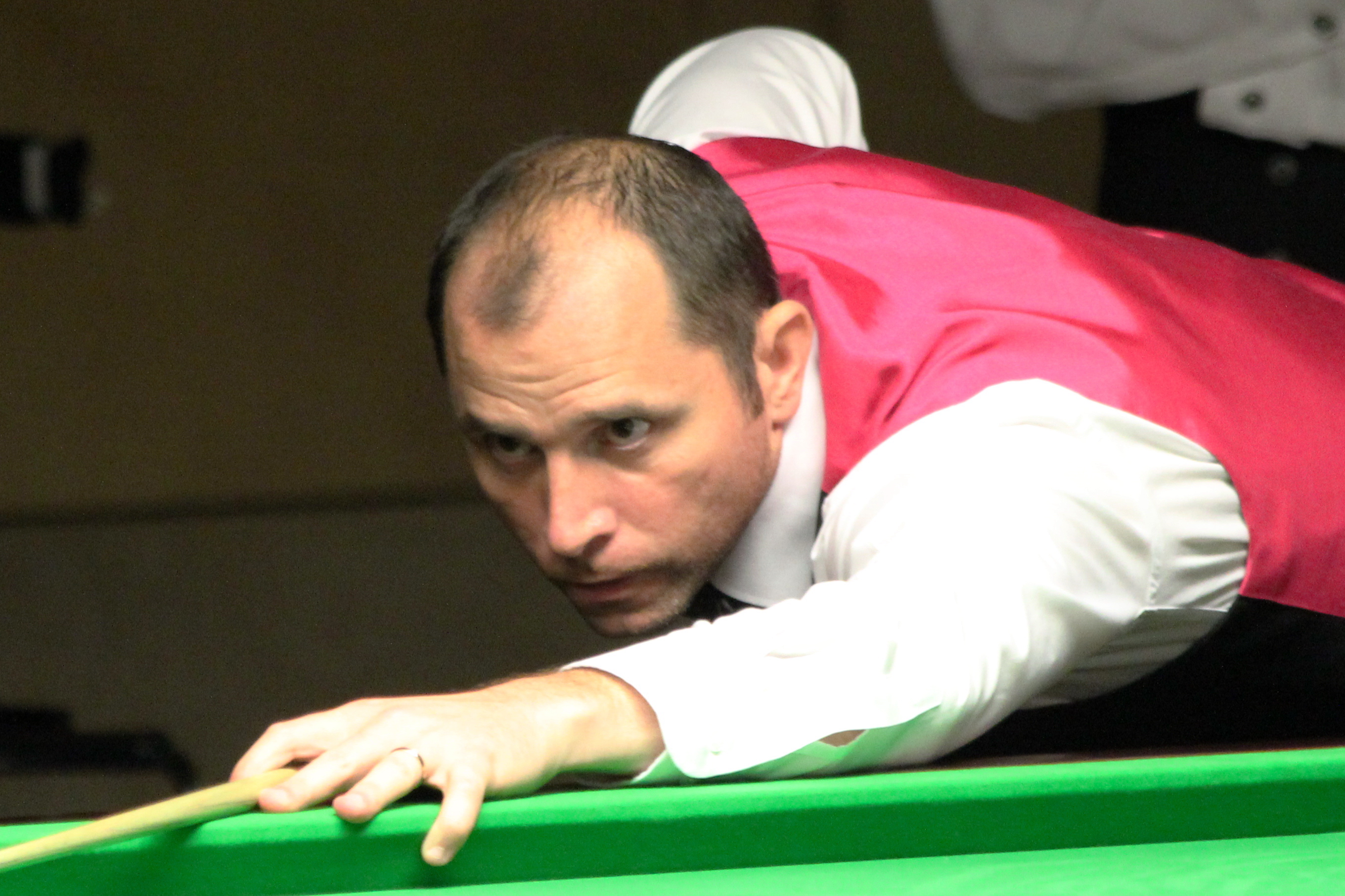 Joe Perry beim Paul Hunter Classic 2012